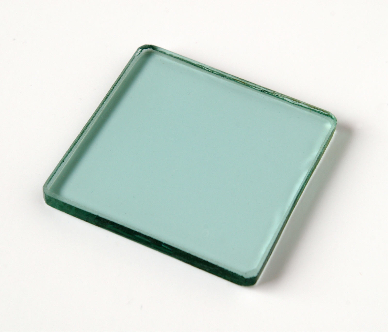 Wärmeschutzfilter aus einem Diaprojektor. Die schwach grün eingefärbte planparallele Glasscheibe ist im Strahlengang zwischen Projektionslampe und Dia angeordnet, sperrt vornehmlich infrarote Strahlung und vermindert dadurch die Erwärmung des Dias. Moderne Wärmeschutzfilter arbeiten mit dichroitischen Beschichtungen, deren Funktion auf Interferenz beruht (hier nicht abgebildet).